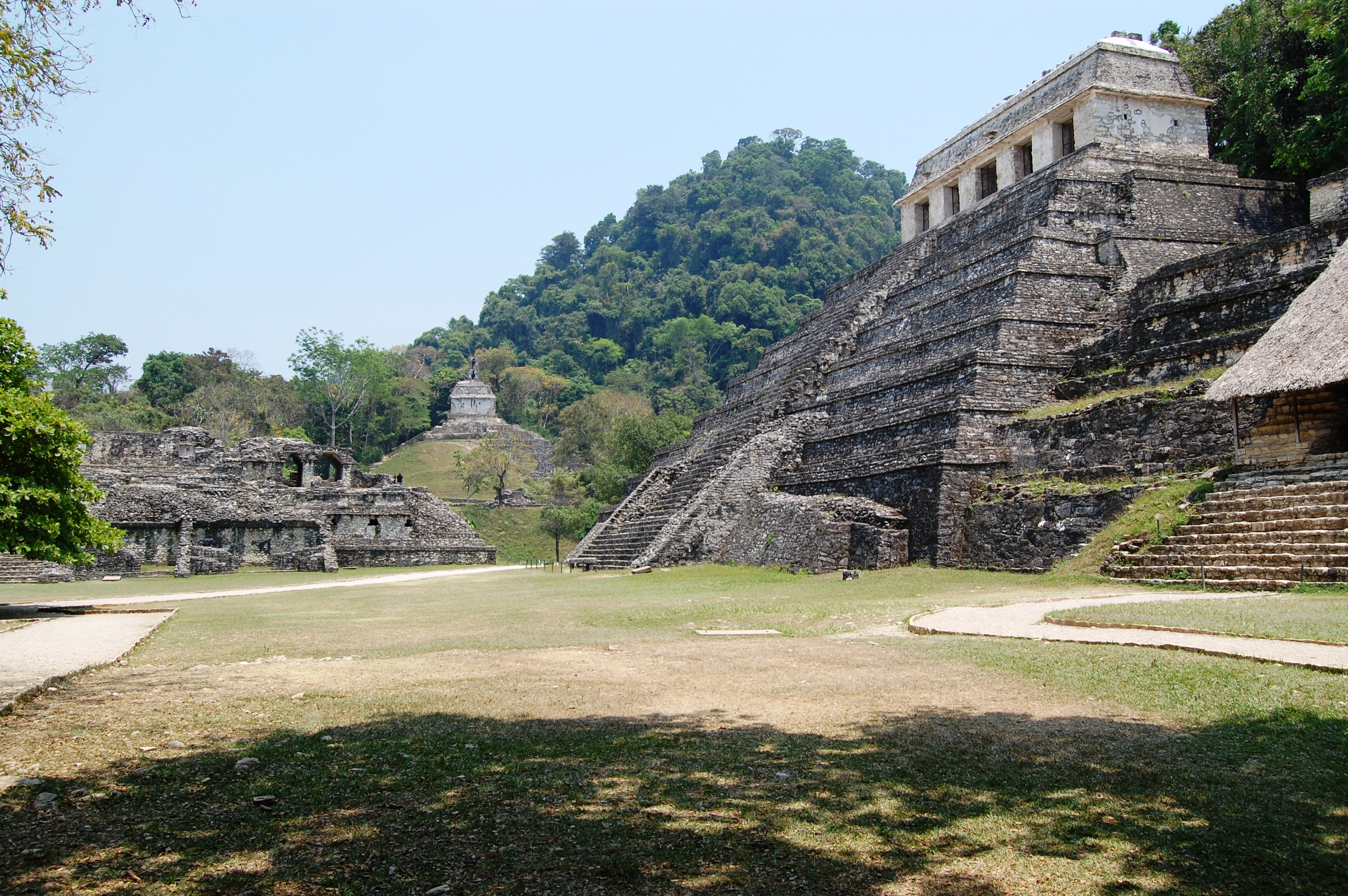 Palenque, Mexico: Temple of inscriptions